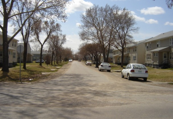 McNab Park Saskatoon, Saskatchewan, Canada